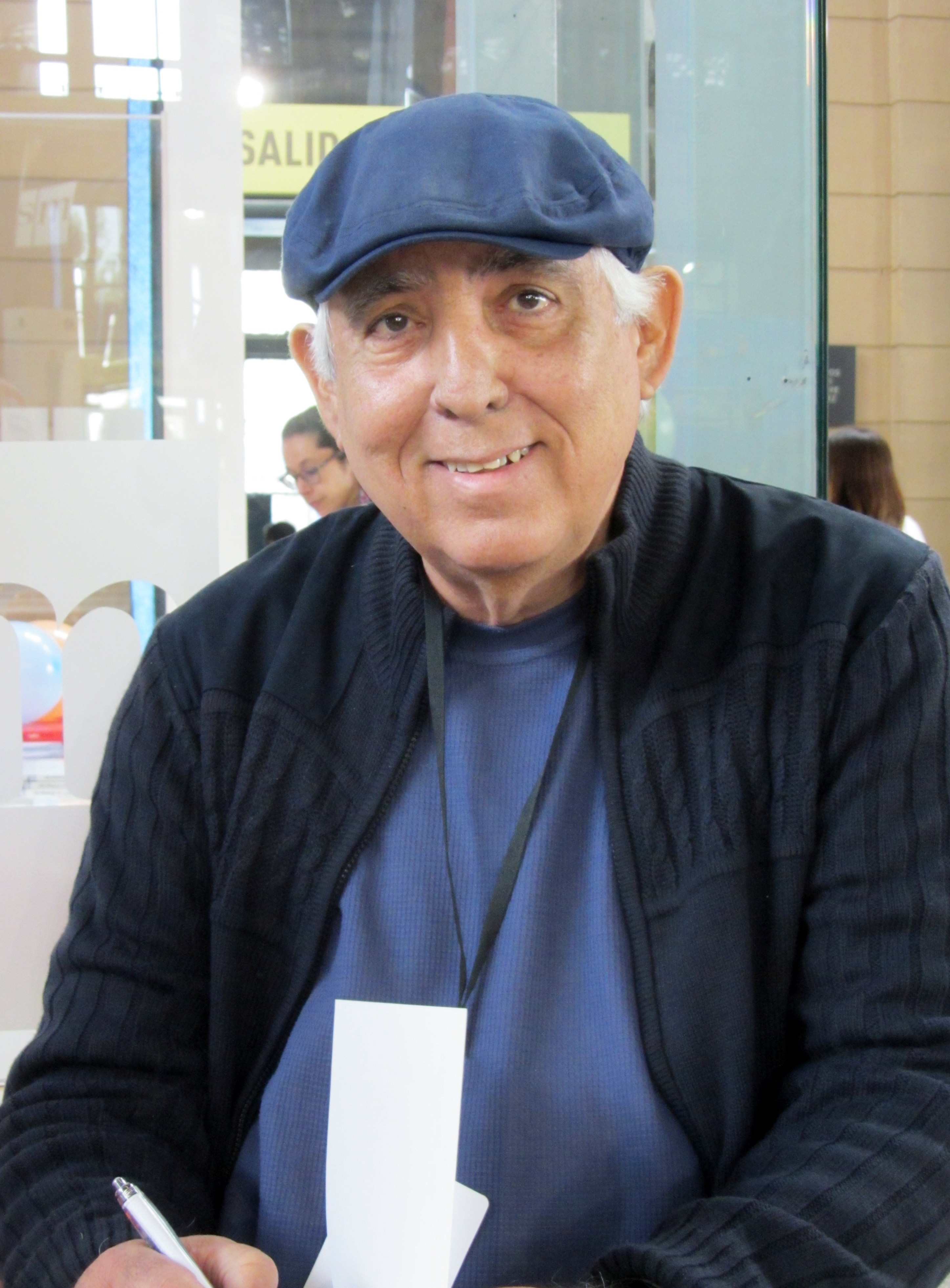 El escritor cubano-chileno Pepe Pelayo en la Feria Internacional del Libro de Santiago 2015